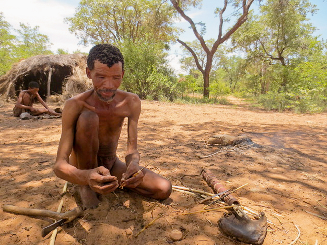 San Mann fügt gefertigte Spitze aus Giraffenknochen an den Pfeilschaft aus hartem Gras.